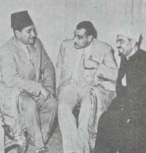 الشيخ محمد فرغلي والزعيم جمال عبد الناصر والأستاذ محمد حامد أبو النصر Licensing تصنيف:جماعة الإخوان المسلمين تصنيف:إخوان مسلمون مصريون